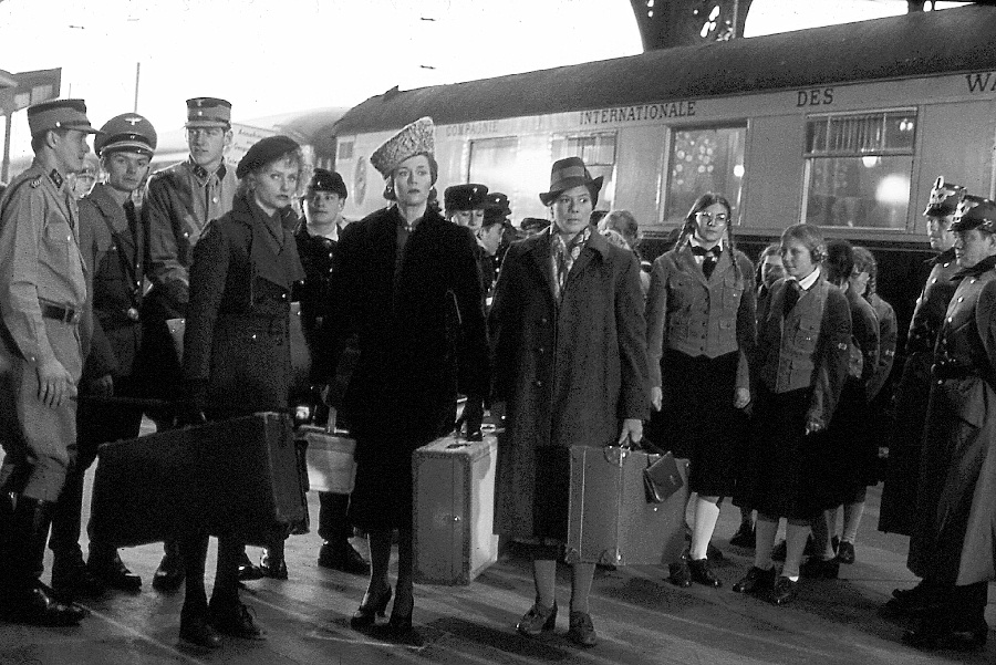 Photo de plateau du tournage du film de Fred Zinnemann «Julia». De gauche à droite, Élisabeth Mortensen, Jane Fonda et Dora Doll. Strasbourg, 1976.